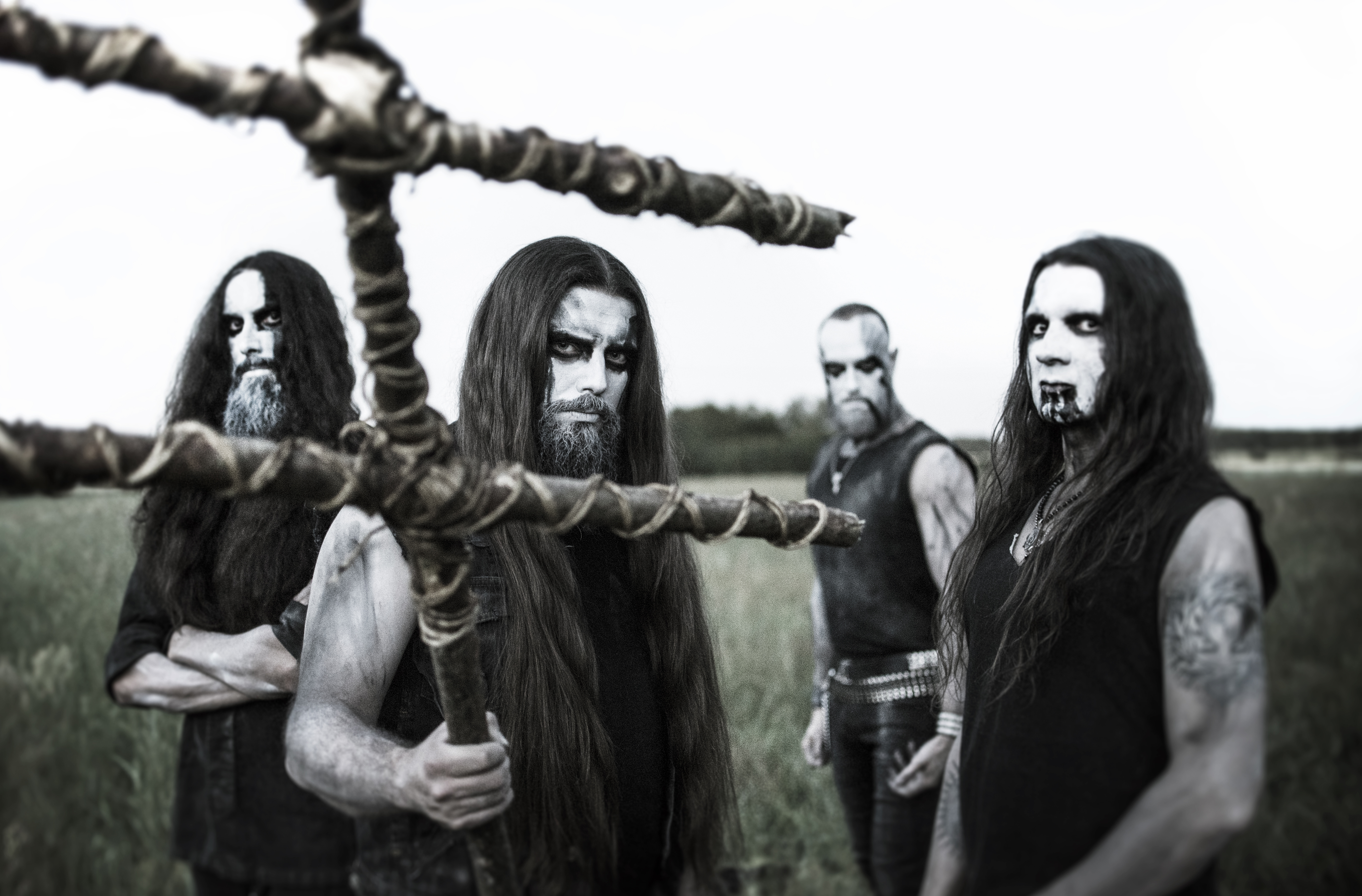 Promo Session 2018